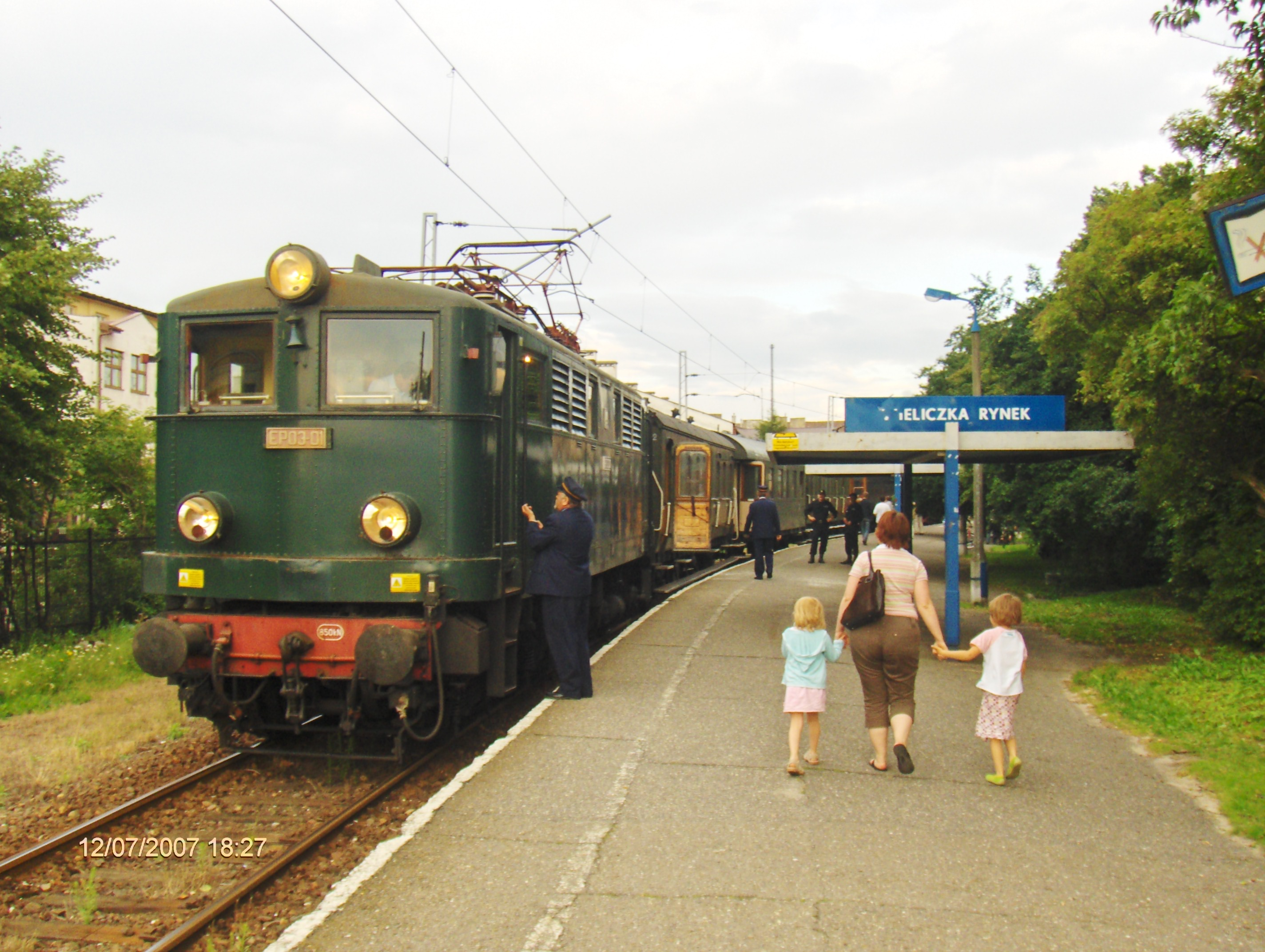 Zabytkowy pociąg na peronie Wieliczka Rynek.